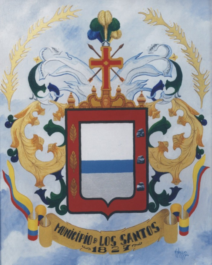 Escudo del municipio de Los Santos